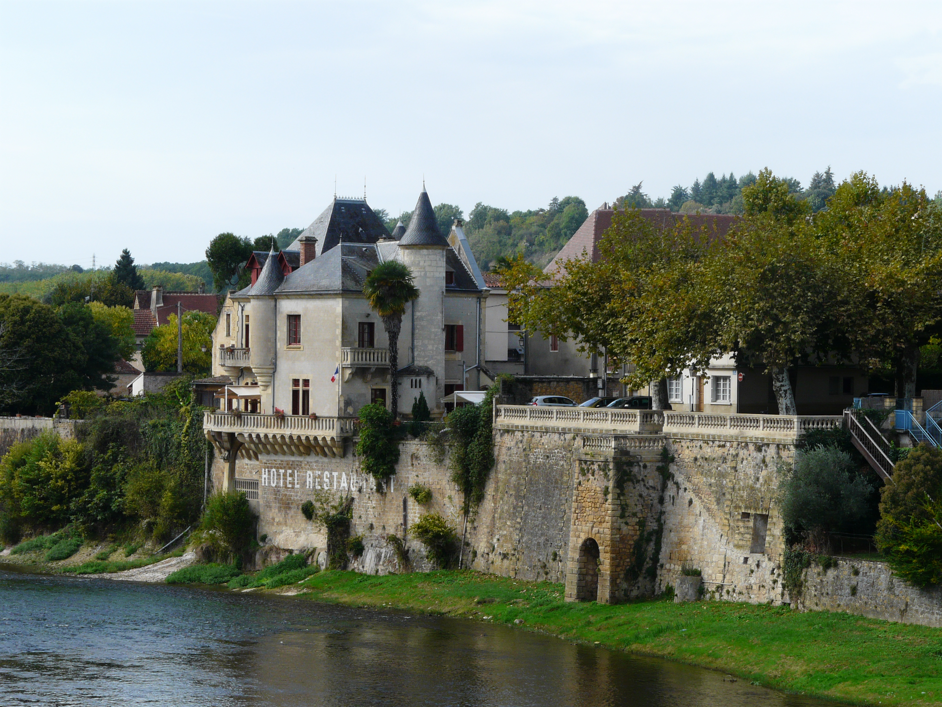 Au bord de la Dordogne, le château de Lalinde vu du sud-est, Dordogne, France. Sur sa droite, la place du Souvenir.